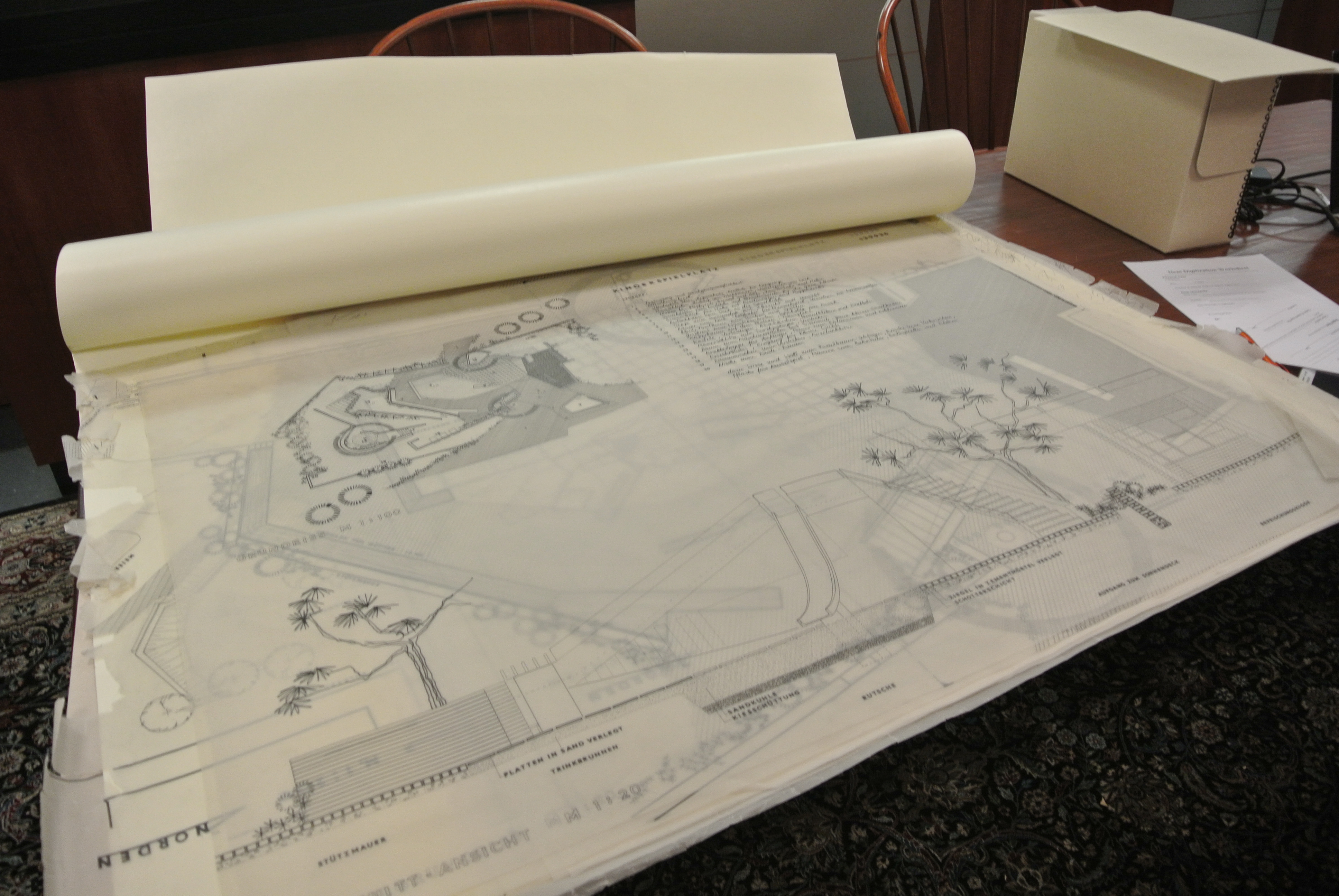 Fotos en el Archivo Internacional de Mujeres en Arquitectura IAWA, Virginia Tech, Blacksburg, Virgina, Estados Unidos, 2016.